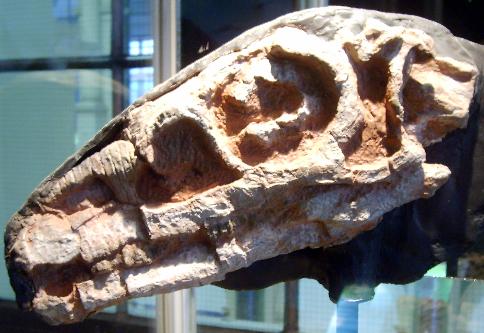 Riojasaurus skull cast, Copenhagen.